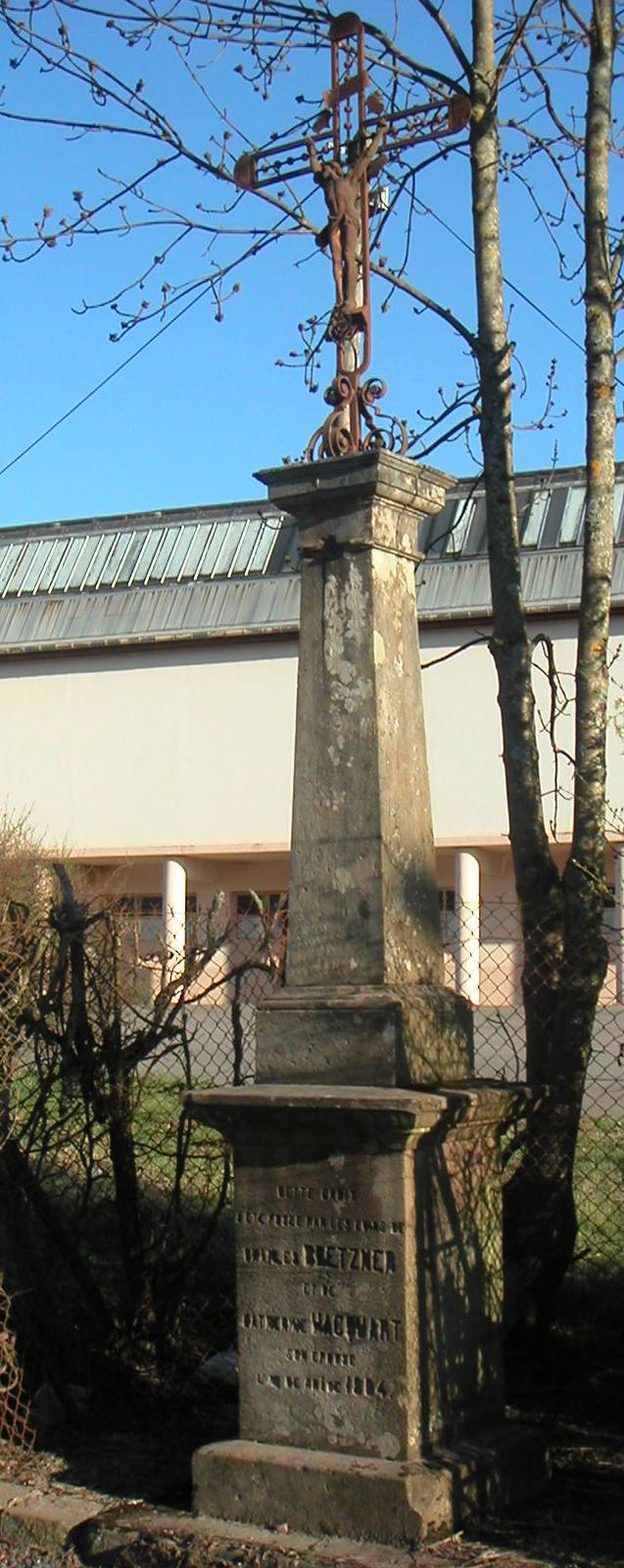 croix votive, située à droite le long de la D.392a en direction de Celles-sur-Plaine - Raon-L'Étape 88372. Devant l'entrée des anciennes casernes du 21°BCP.